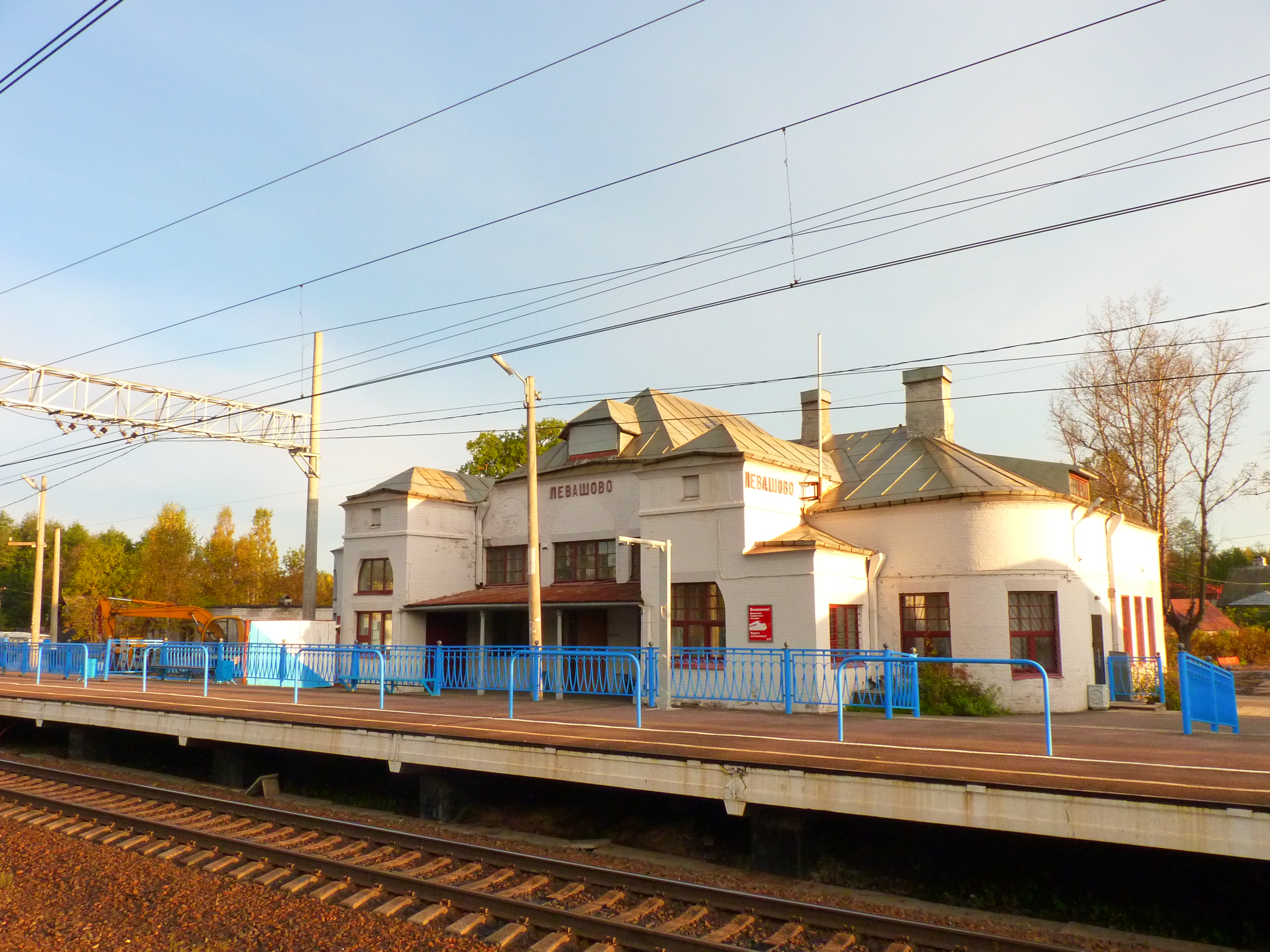 Здание вокзала с платформы №1.